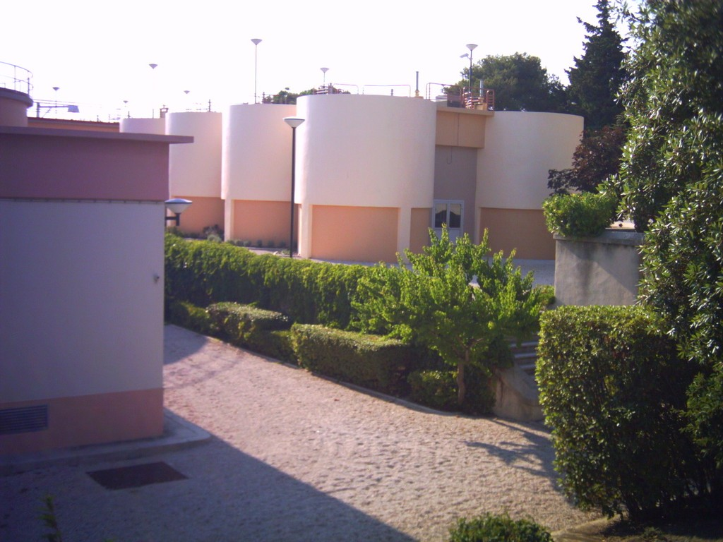 La station de traitement des eaux de Saint-Barnabé (Marseille-12°)